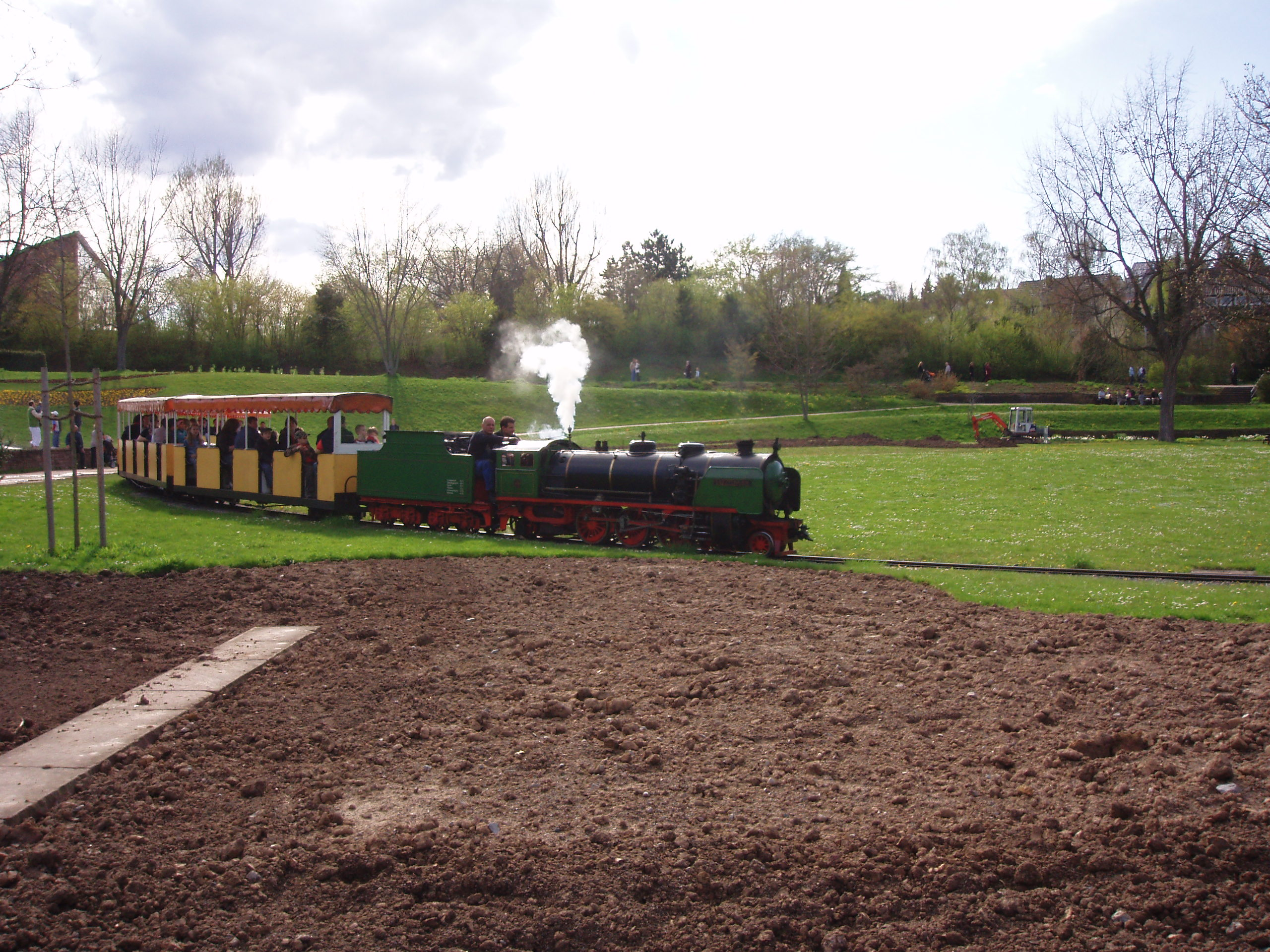 Killesberg